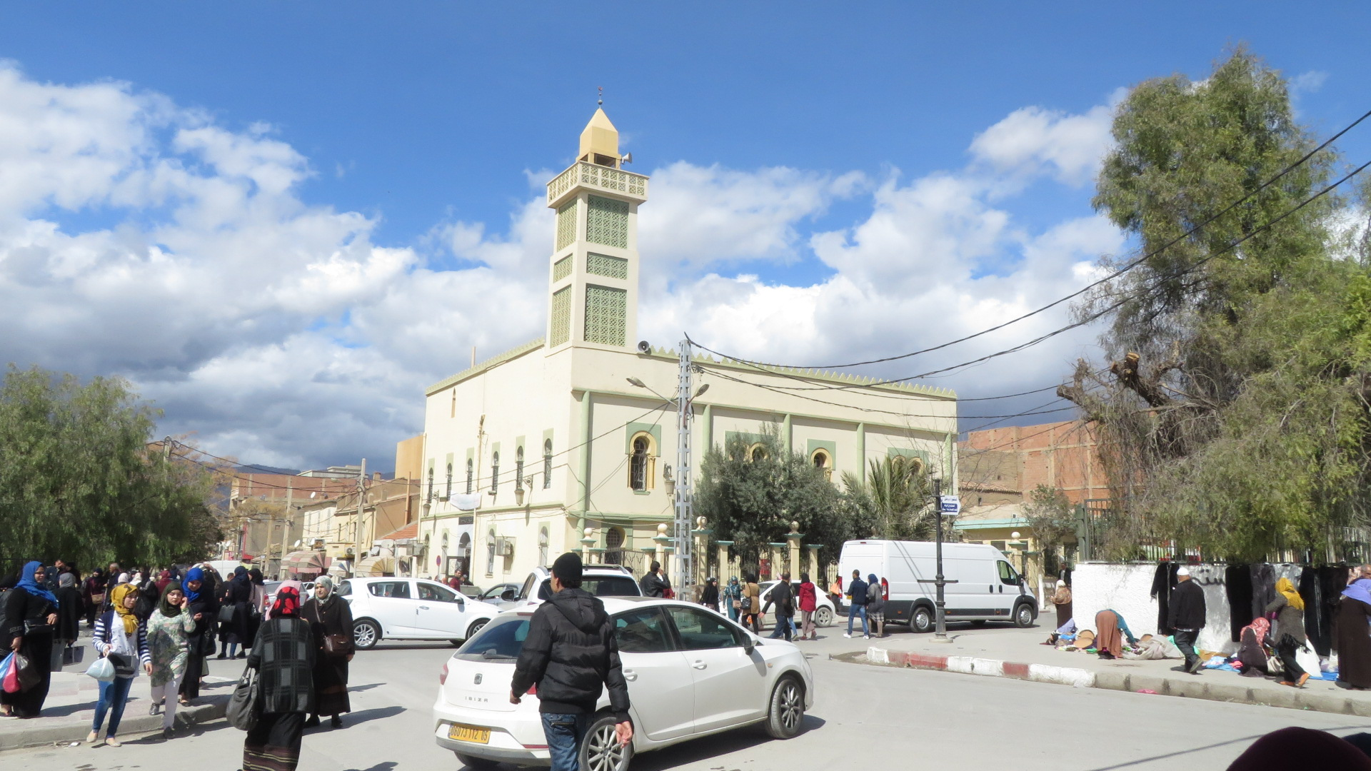 Al Atik mosquée Batna